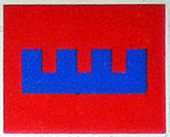 Auf dem Jeschken-Kammweg: Kammwegzeichen (blauer Kamm auf rotem Grund)